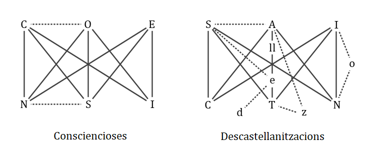 Exemples de aodarmdromes que contenen el subgrup K33